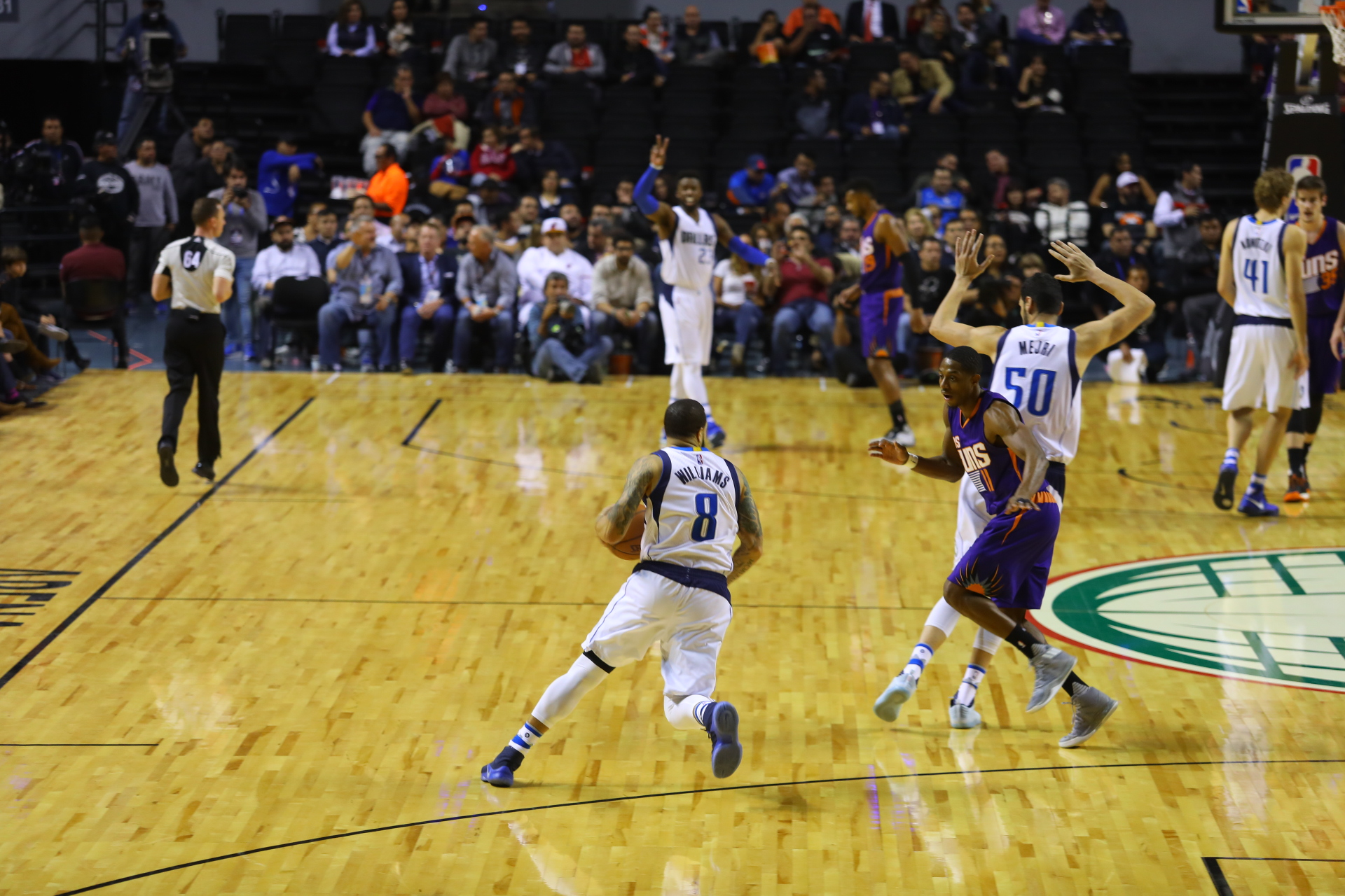 Partido NBA